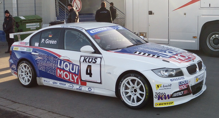 "Paul Green" fährt mit seinem BMW 320si (Team: Liqui Moly Team Engstler) von der Strecke zurück zu den Boxen der ADAC Procar. Fotografiert in Oschersleben beim ersten Lauf der Procar-Saison 2012.